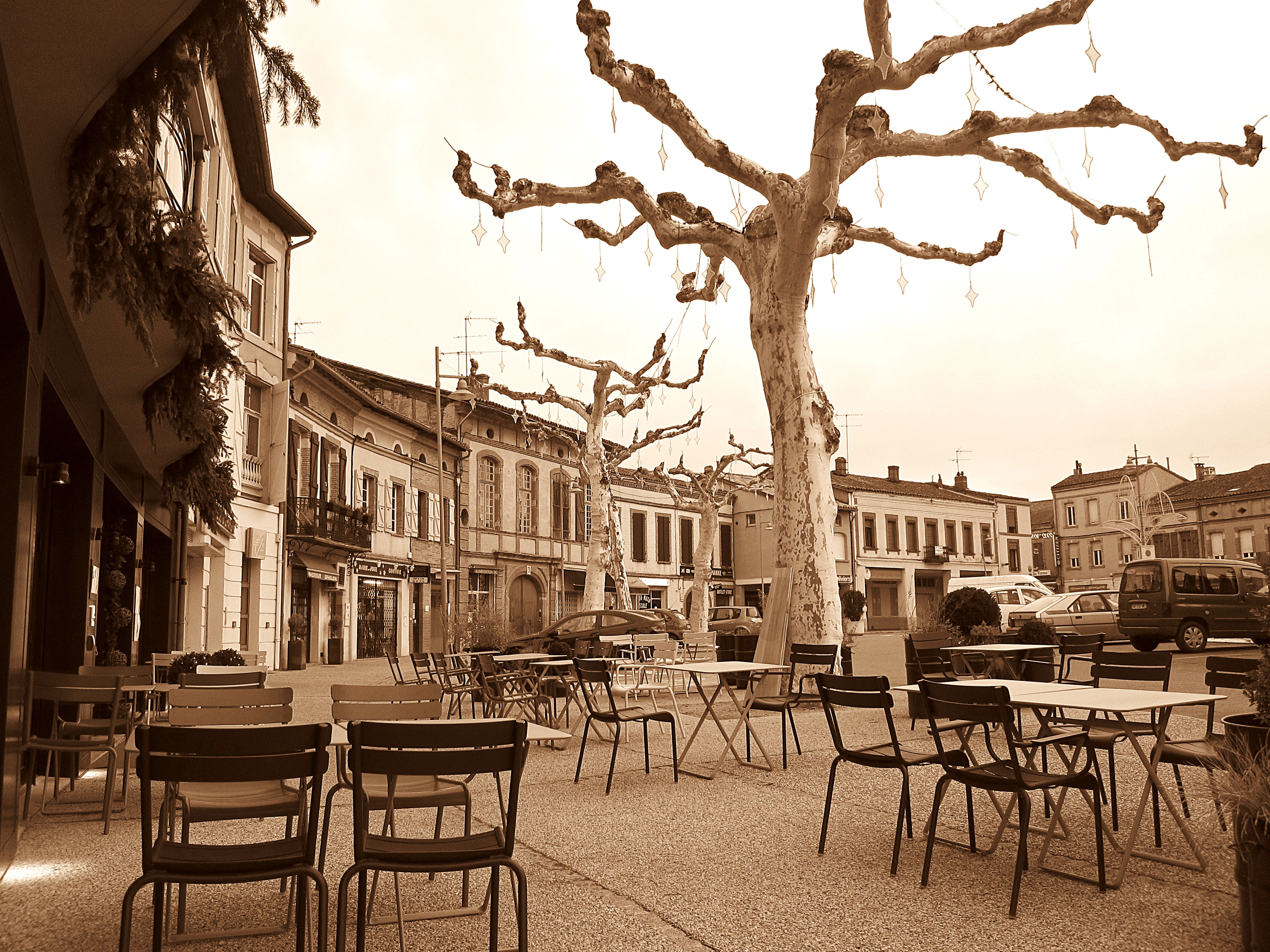 L'Isle-Jourdain (Gers, Midi-Pyrénées, France) : La terrasse de l'hôtel-restaurant "L'Échappée Belle", 2 Place Gambetta.